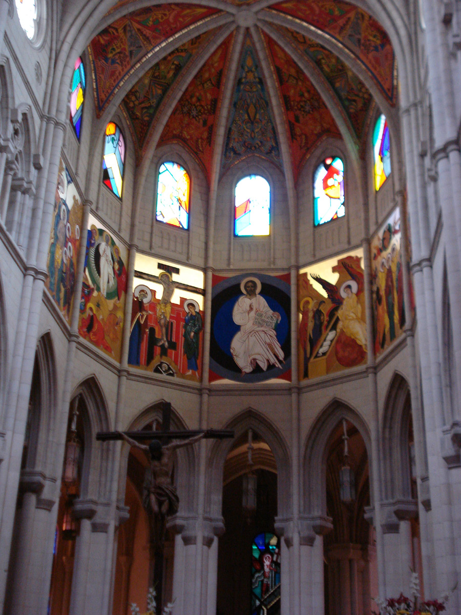 Frescos Kiko Arguello Catedral de la Almudena Madrid